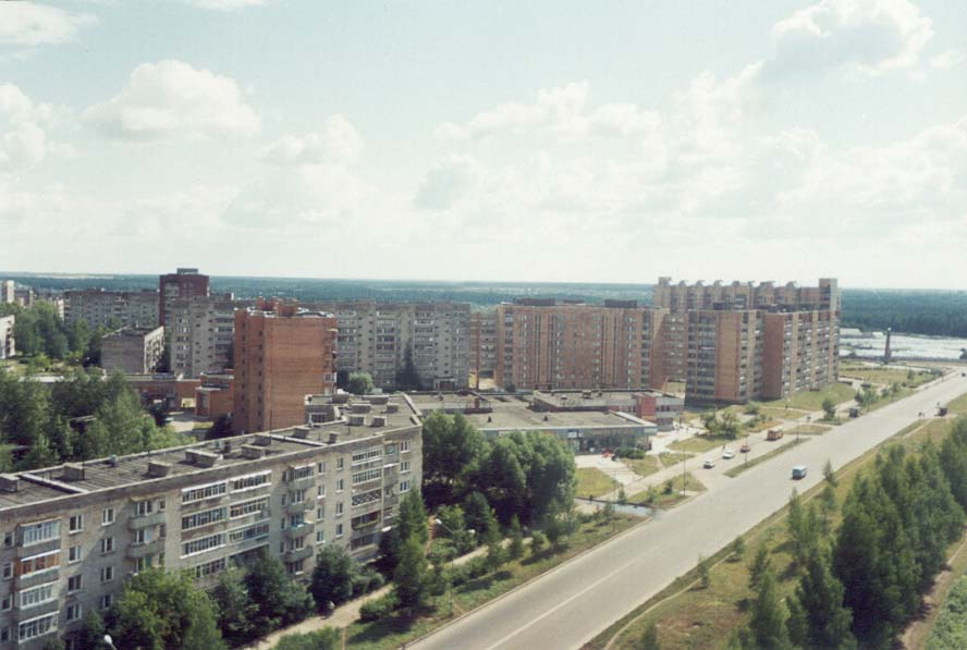 Улица Ленина (Кирово-Чепецк, 8 микрорайон)